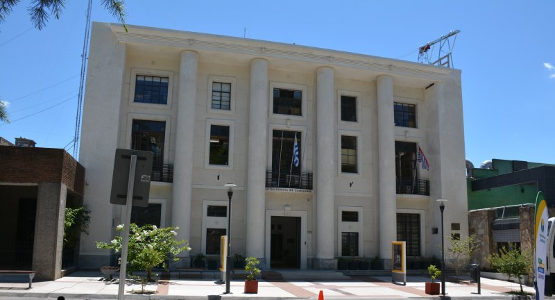 Sede del Gobierno del Departamento de Canelones